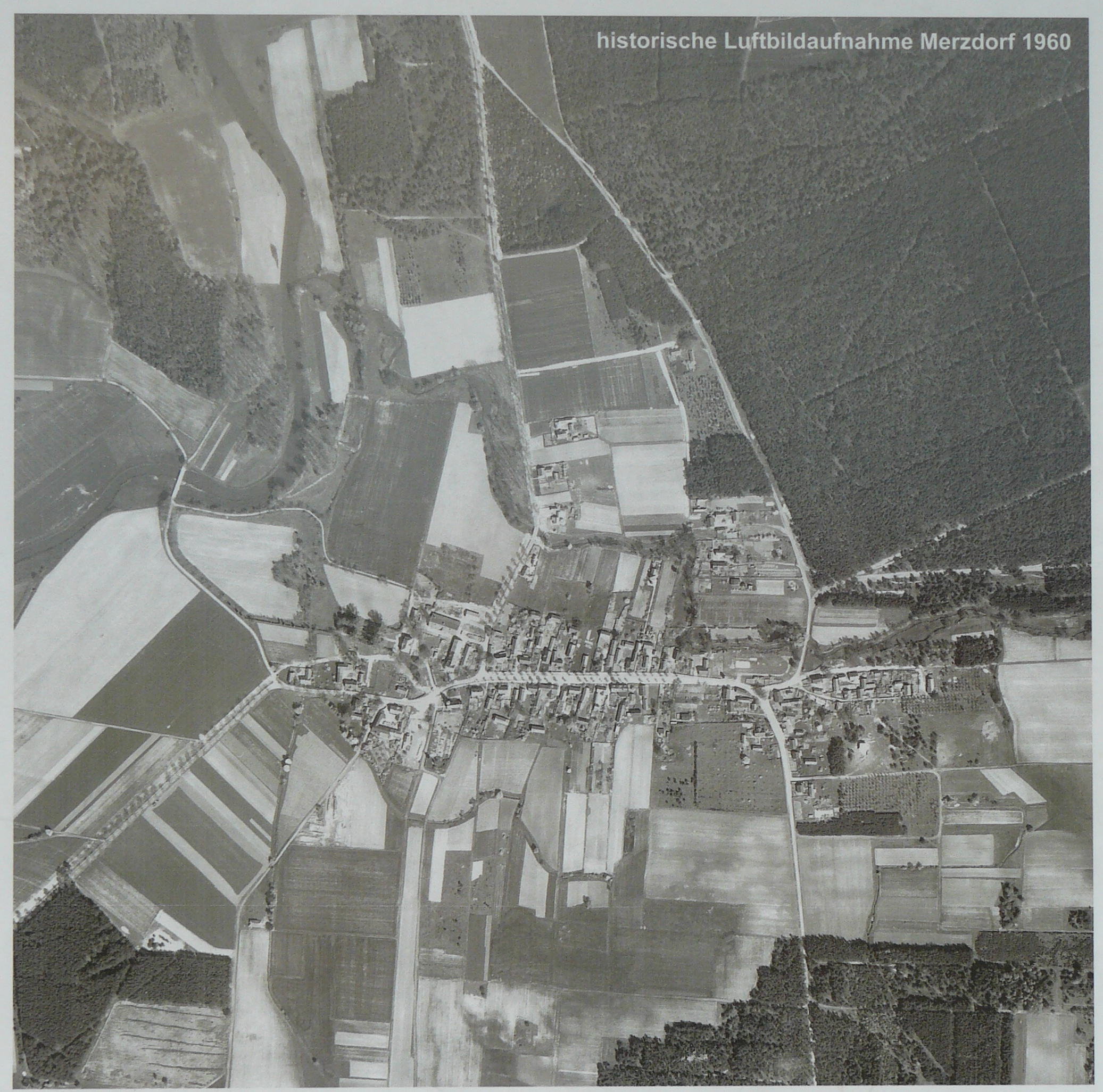 Luftbild von Merzdorf aus dem Jahr 1960 auf der Informationstafel an der Gedenkstätte für die abgebaggerten Dörfer Merzdorf und Schöpsdorf am Bärwalder See